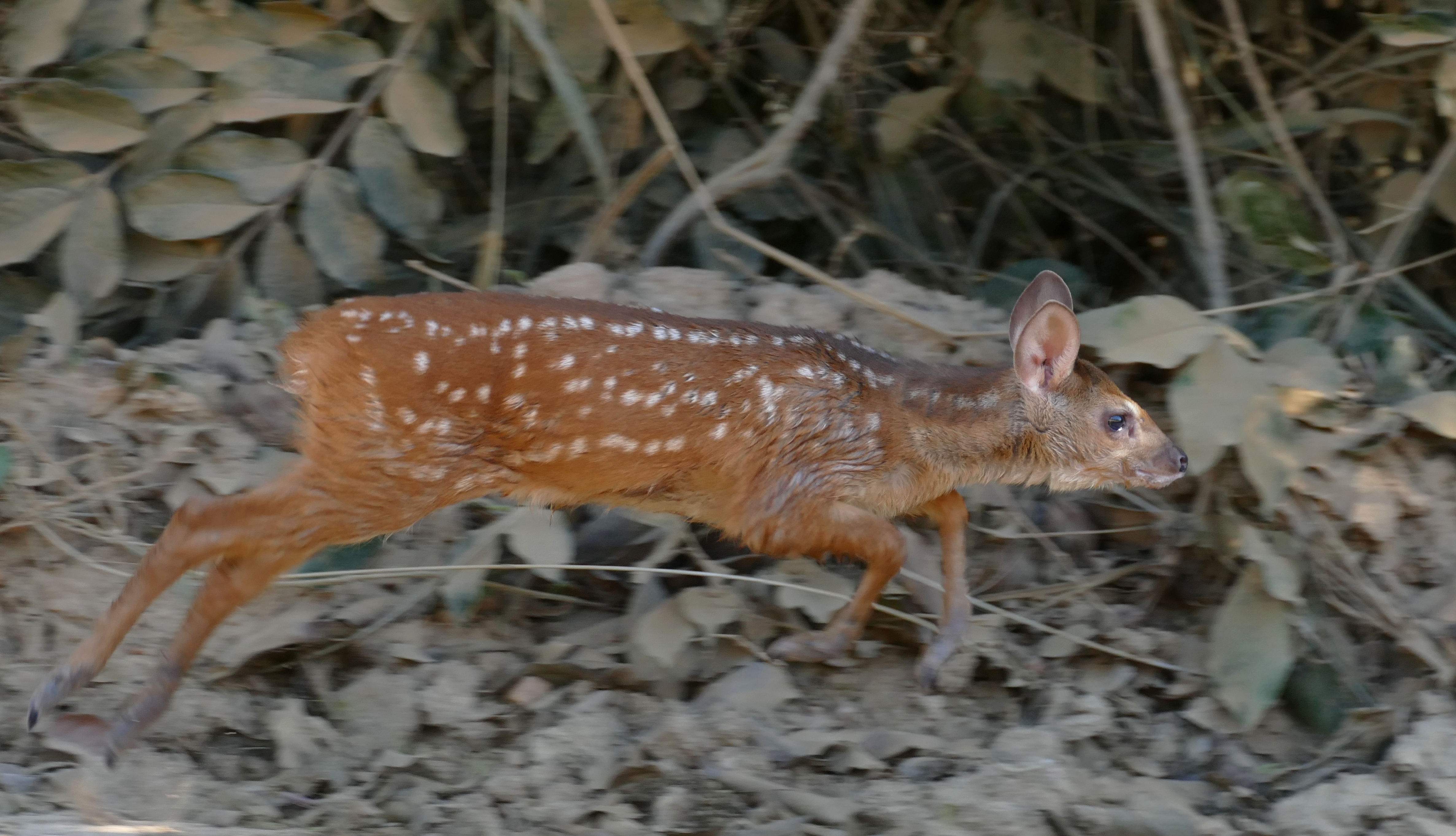 Transpantaneira, Poconé, Mato Grosso, BRAZIL